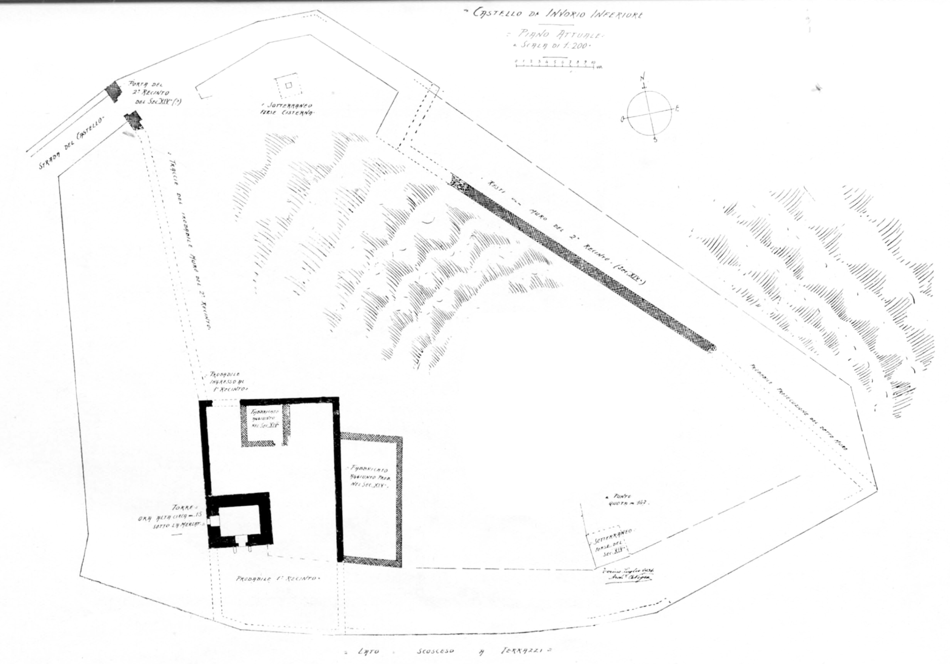 Castello di Invorio, pianta attuale